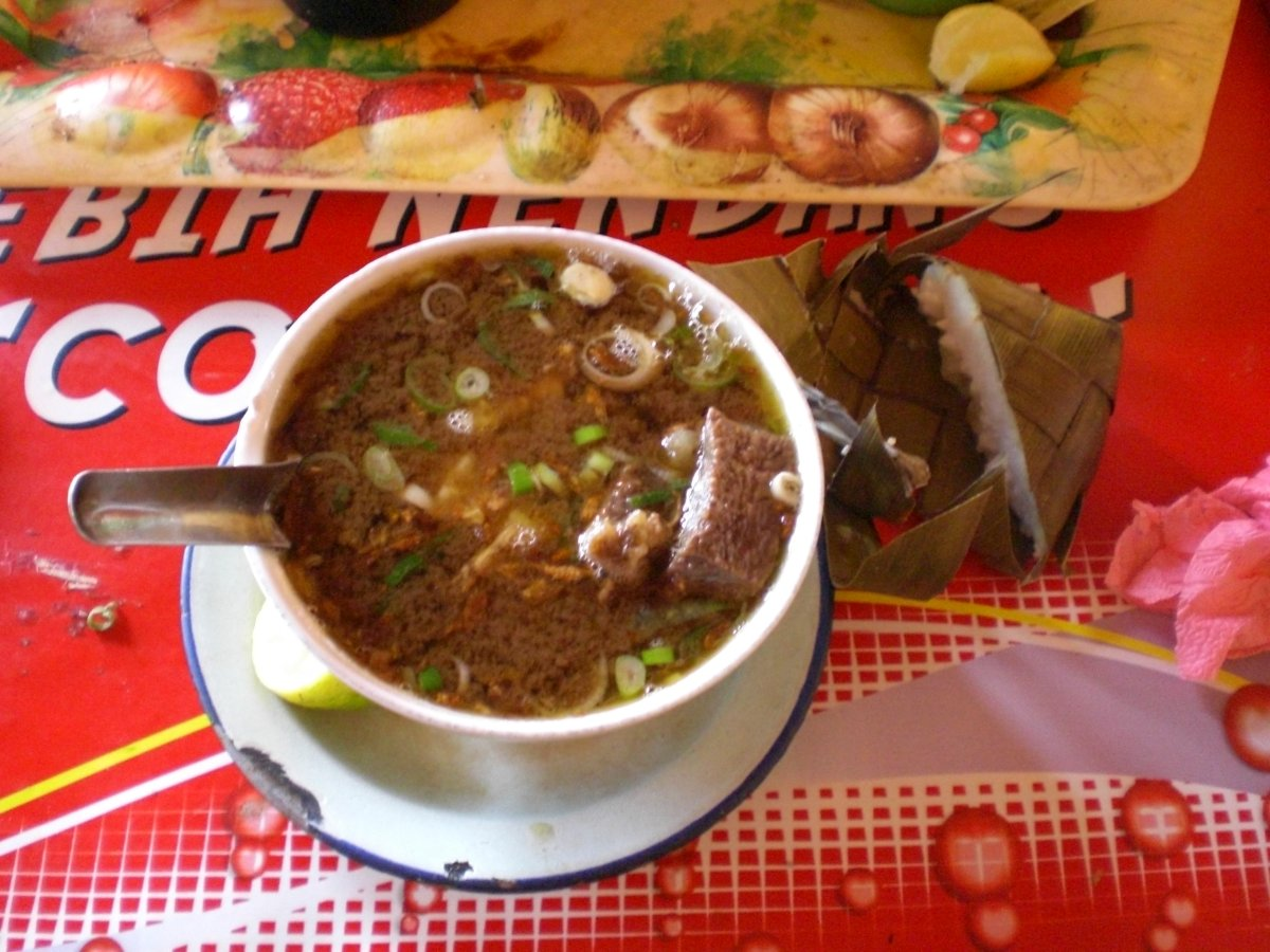 Coto Makassar with Ketupat